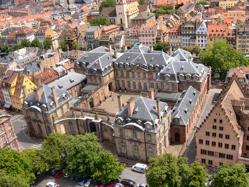 Le Palais des Rohans pris depuis la cathédrale de Strasbourg